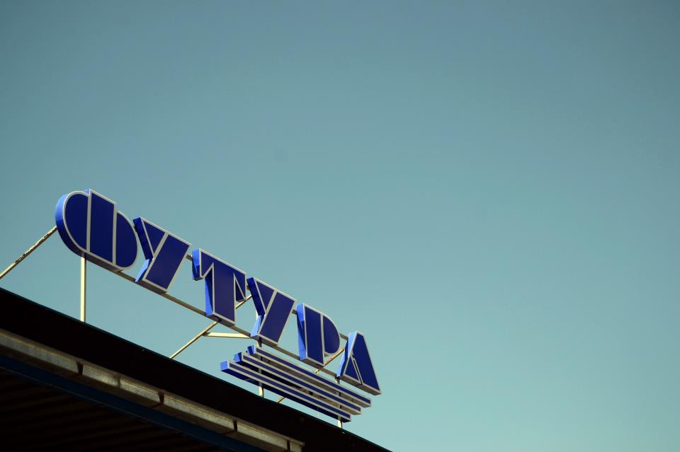 Футура ПП